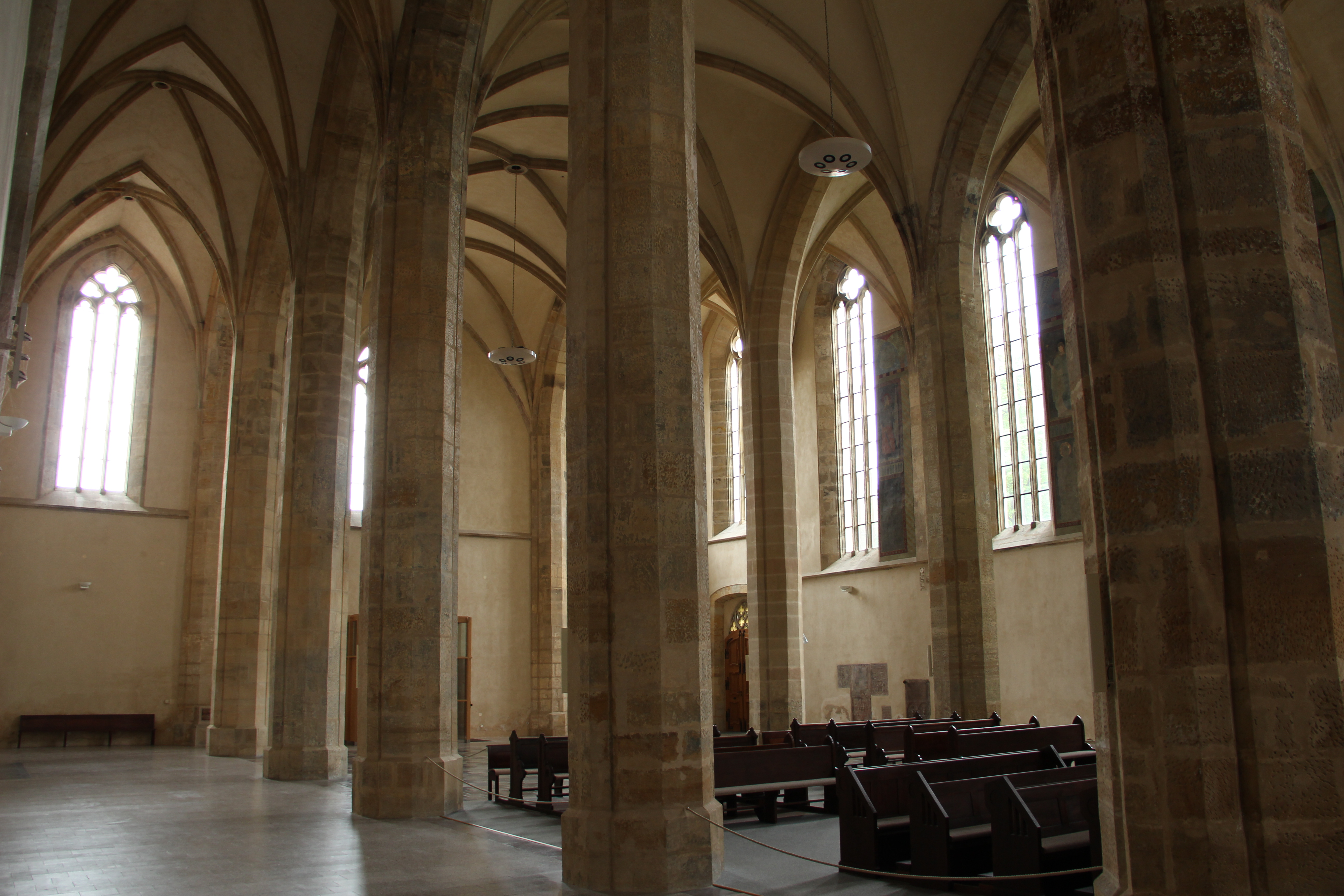 Interér